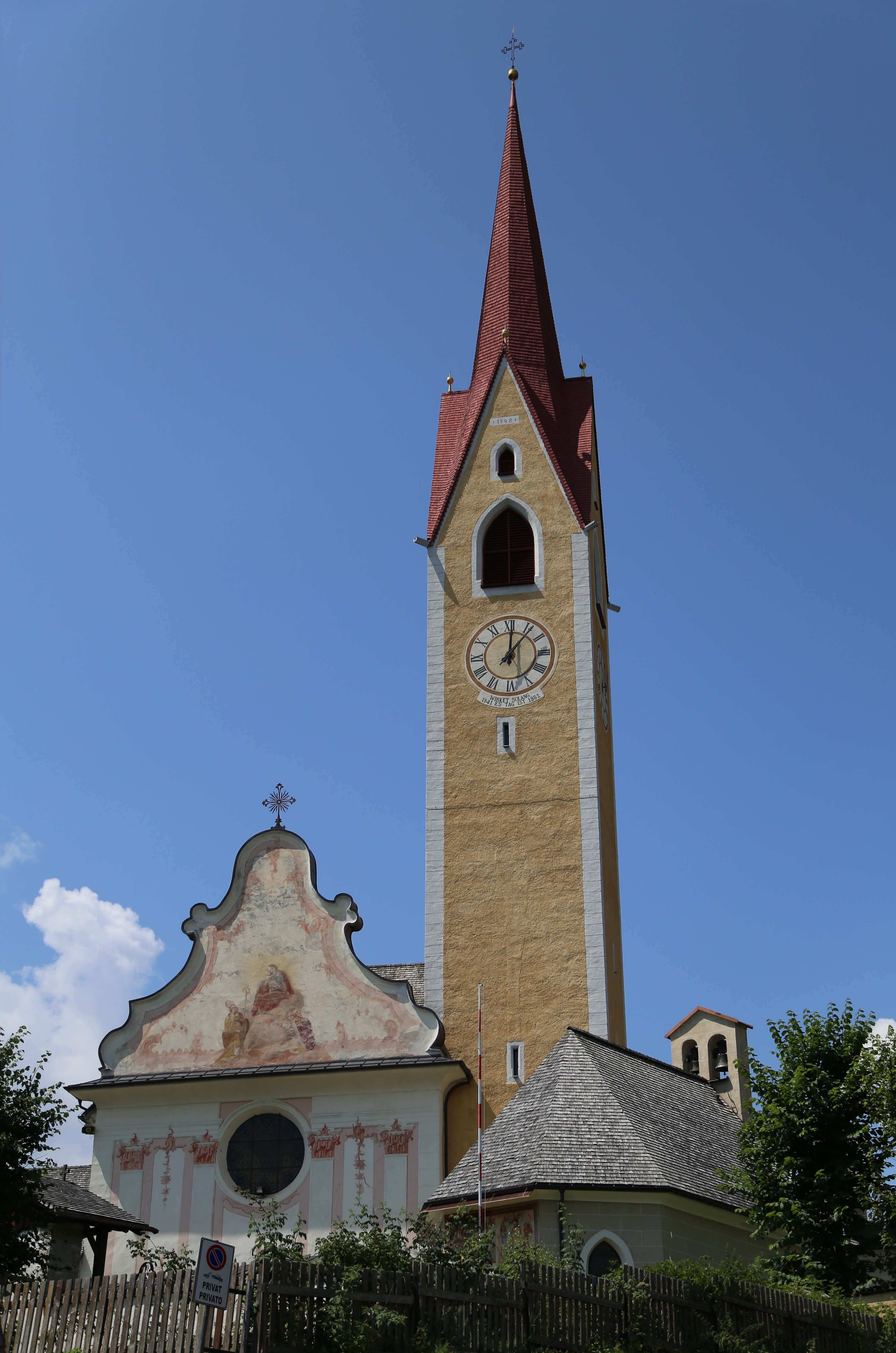 St. Ingenuin und Albuin, Welsberg-Taisten Spitzturm, abgesetzter, abgerundeter Chor, dahinter Sakristeianbau. Geschwungener Giebel und gemalte Pilasterarchitektur an der Fassade. Ab 1770 wurde der spätgotische Kirchenbau durch Franz Singer umgebaut: Tonnengewölbe und Flachkuppel, Wandpfeilerraum. Freskenausstattung von Franz Anton Zeiller, 1771. 1472 wurde die Grabkapelle der Grafen von Welsberg angebaut: Zentralbau auf quadratischem Grundriß, Pyramidendach mit Dachreiter.